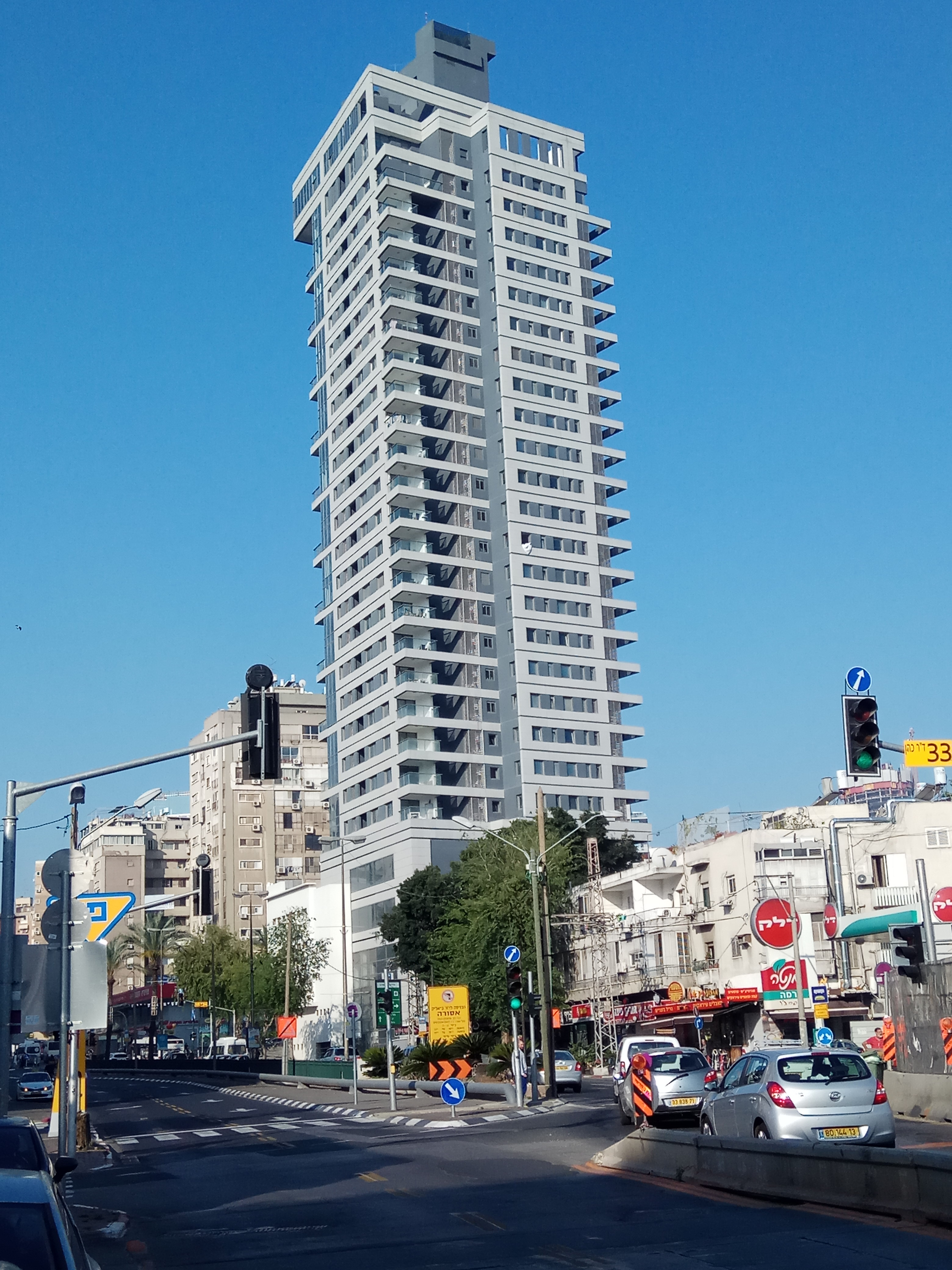 מגדל רמה ברמת גן